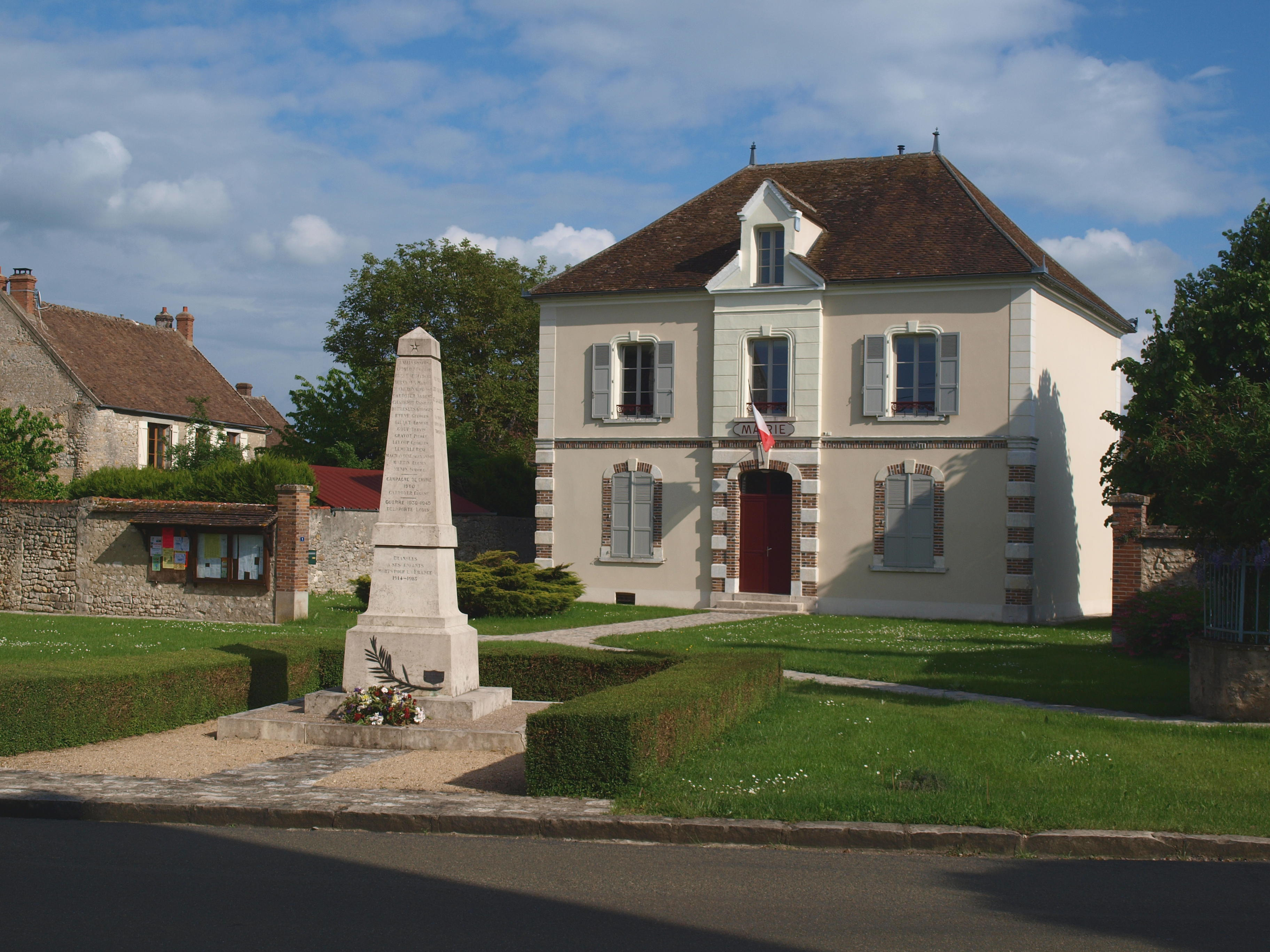 Bransles (Seine & Marne, France) , la mairie